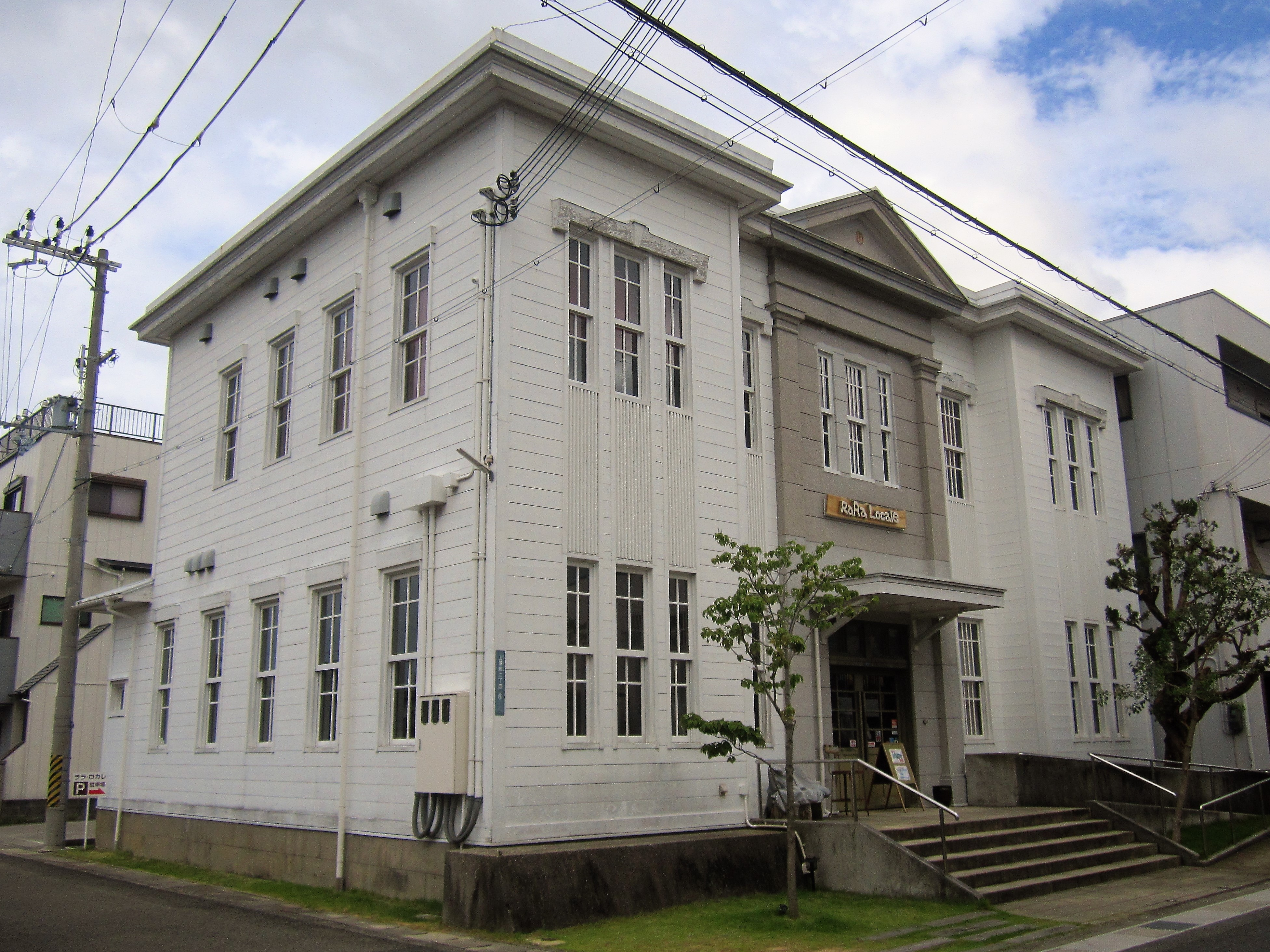 ララ・ロカレ（旧田辺市警察署・田辺市上屋敷）